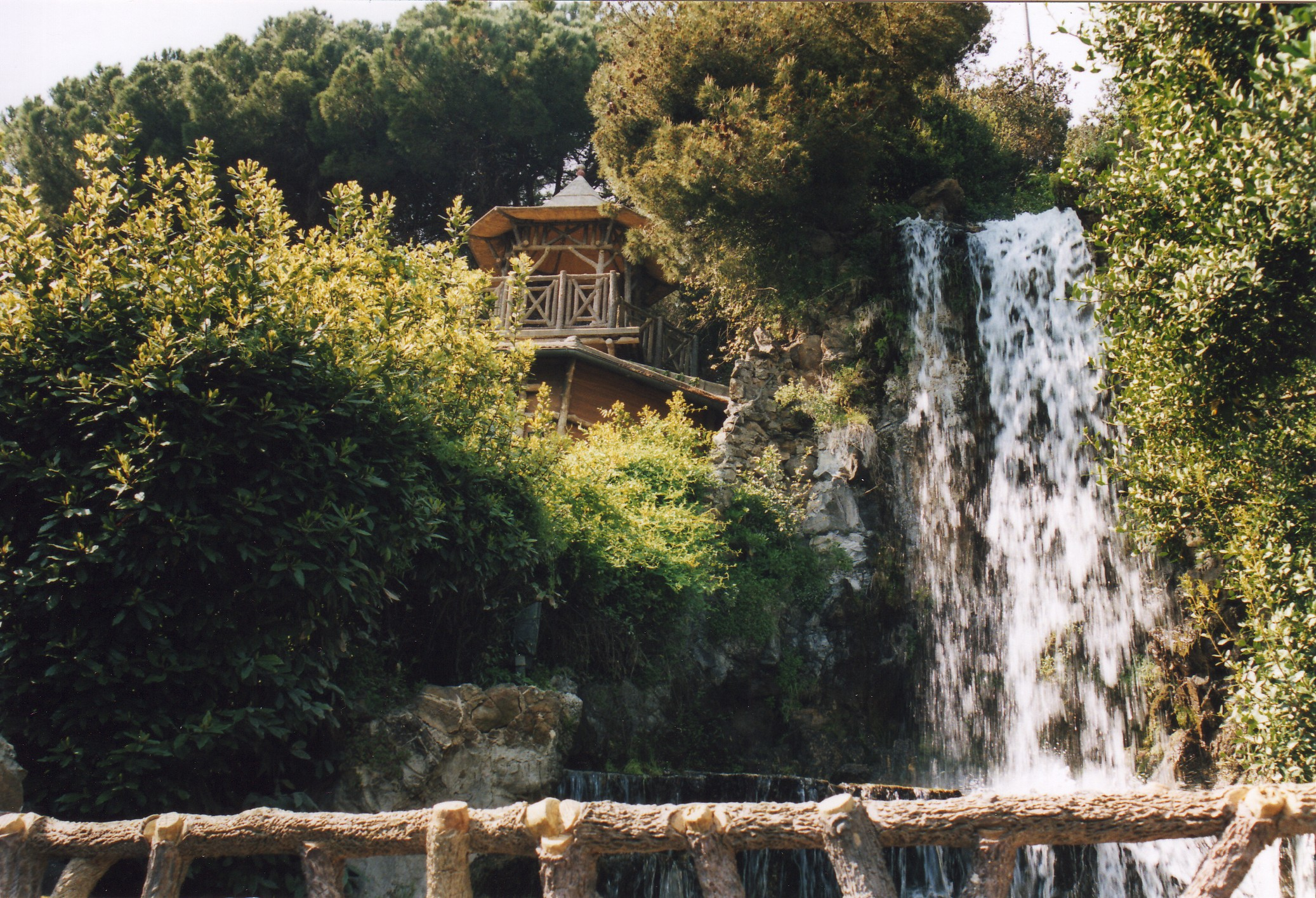 Parco Villetta Di Negro, Genova. La cascata.